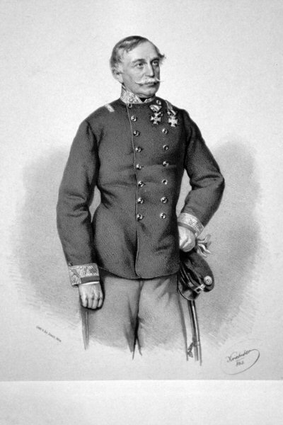 Valentin Veigel von Kriegeslohn (1802-1883), k. k. Feldmarshallleutnant, Lithographie von Josef Kriehuber. 1863